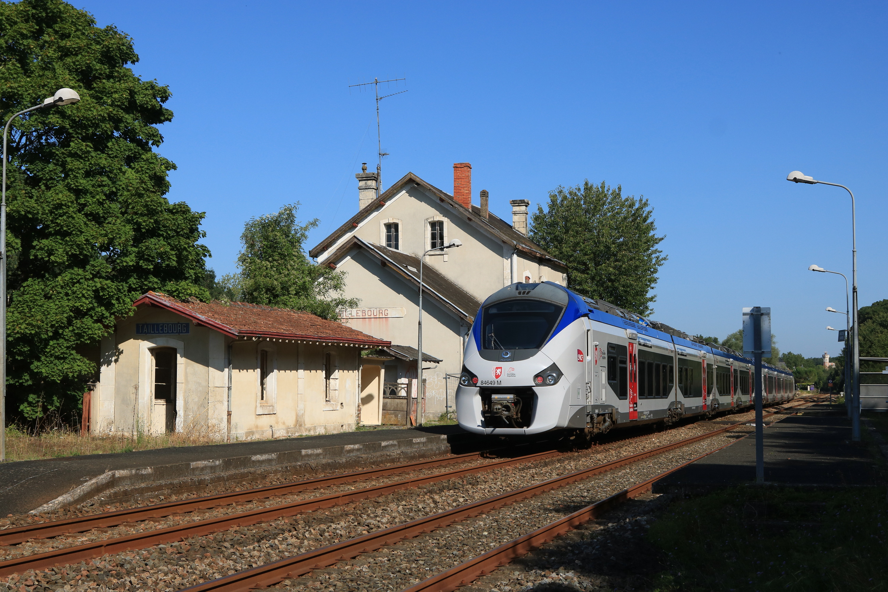 Le TER n° 864762 (Saintes - La Rochelle-Ville) assuré par les B 84649/50 et B 84675/6 passe en gare de Taillebourg.